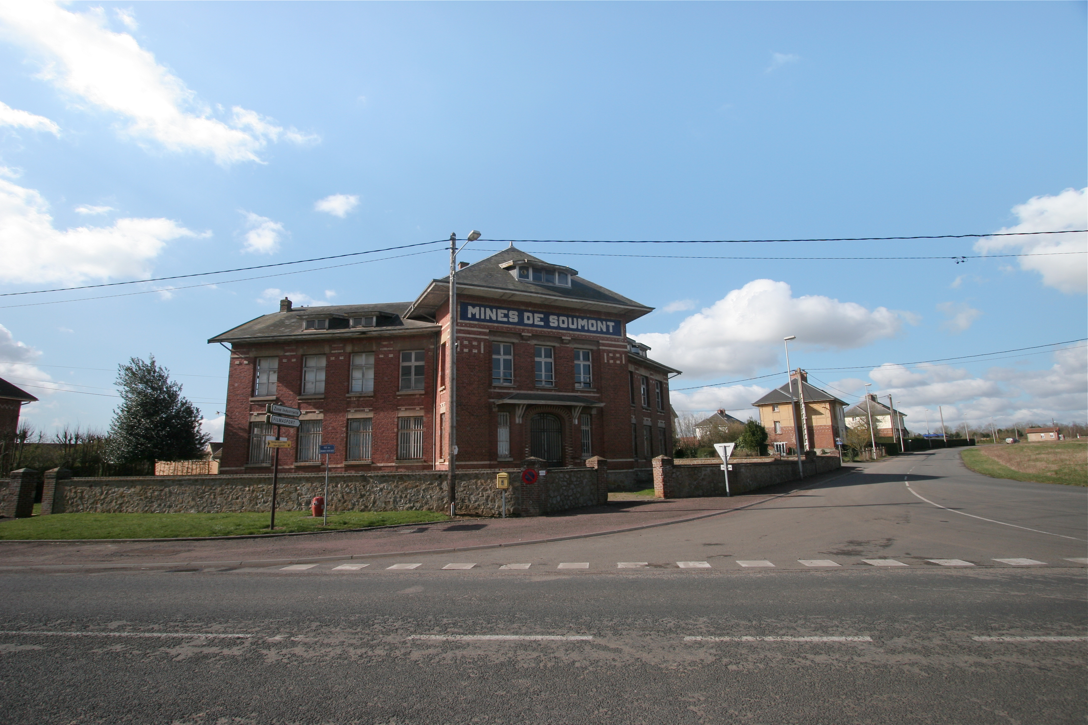 Grands bureaux de la mine de Soumont-Saint-Quentin, Calvados, France